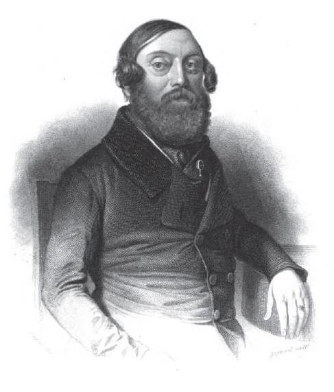 Wenceslao Ayguals de Izco, escritor español del siglo XIX